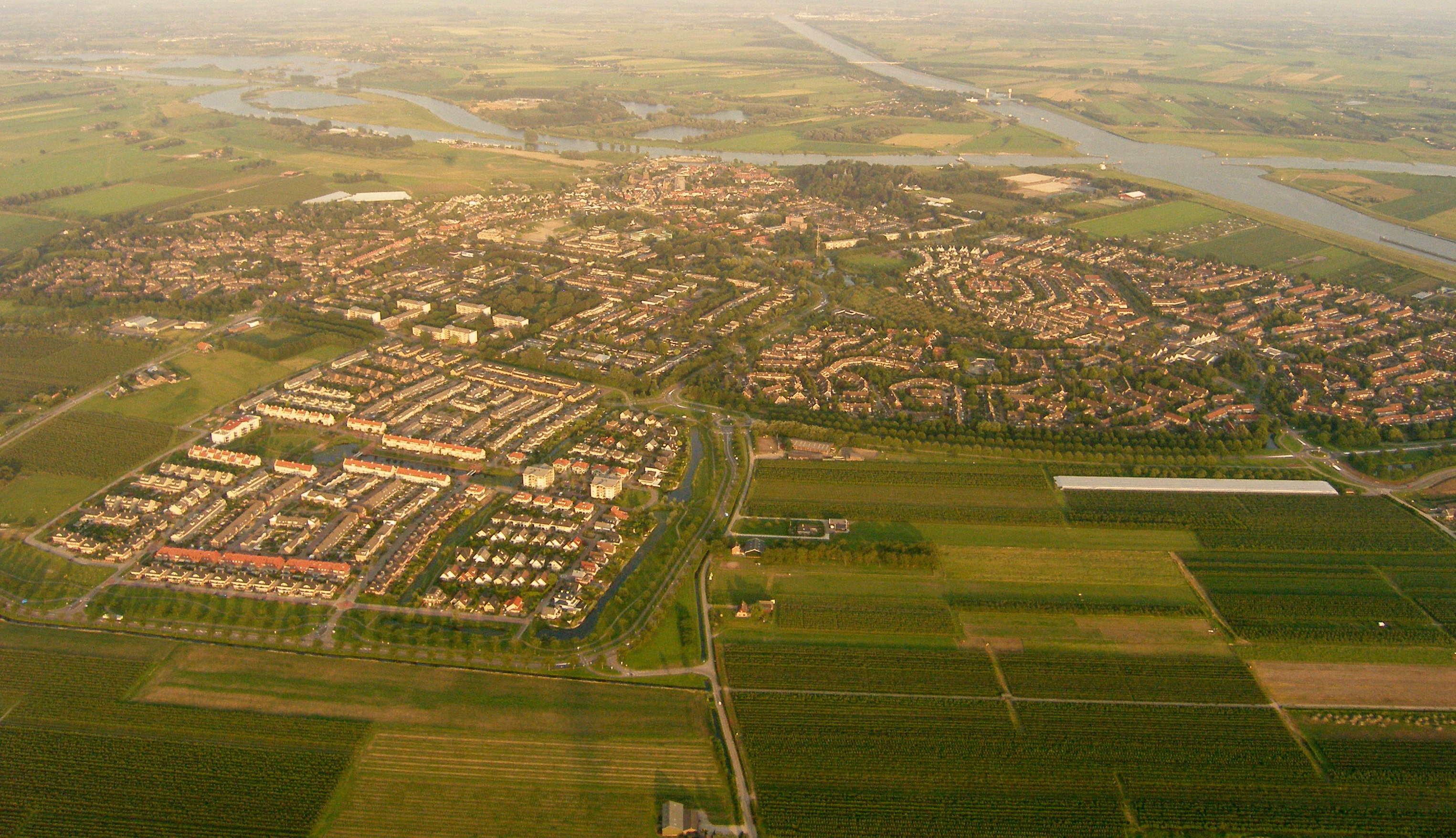 The city of Wijk bij Duurstede (the Netherlands). From left to right: Nederrijn, Amsterdam-Rhine Canal, and Lek river.